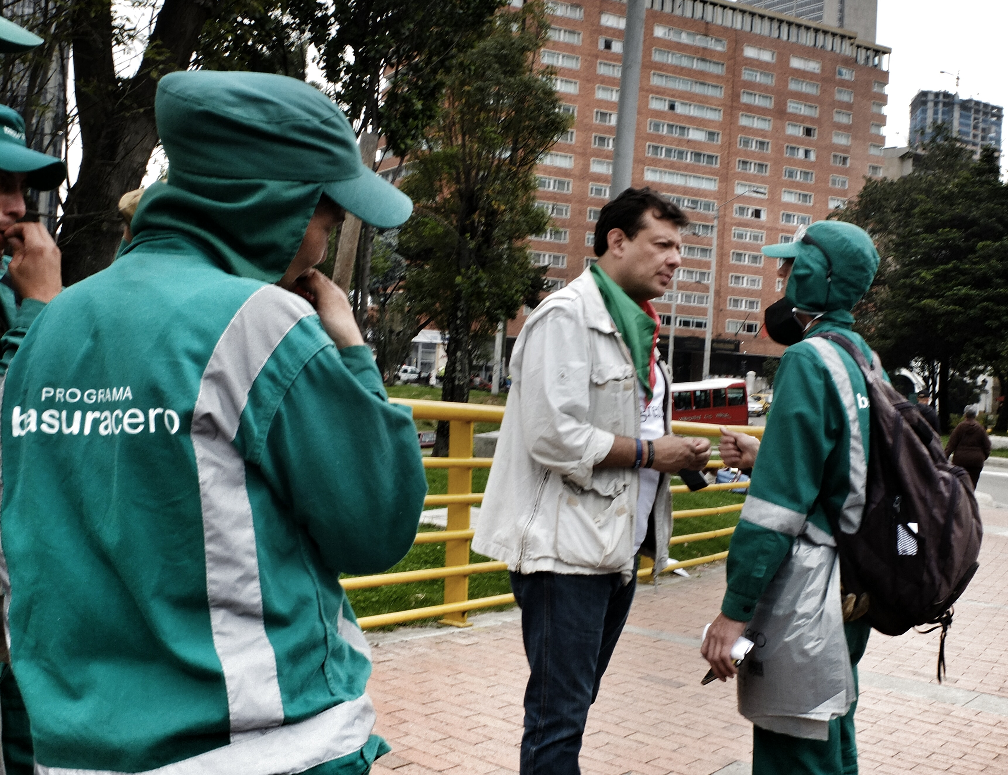 Hollman Morris... #1deMayo #Bogota